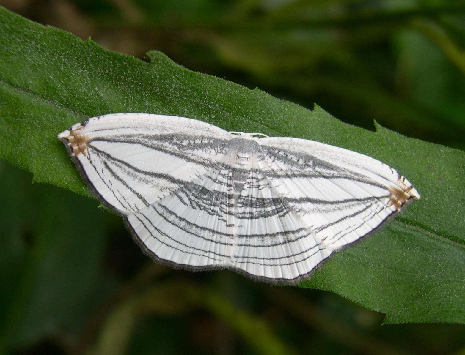 Acropteris iphiata (Guenée, 1857)(Uraniidae: Microniinae) Wingspan: about 30 mm Loc: Yokohama, Honshu, Japan. June 7 2006. Distribution: China, Japan（Hokkaido, Honshu, Shikoku, Kyushu) and Korean Peninsula. Host Plants: Asclepiadoideae (Metaplexis japonica, Tylophora aristolochioides, Tylophora floribunda, Tylophora japonica, Cynanchum austrokiusianum). ja: ギンツバメ（ツバメガ科：ギンツバメガ亜科） 開張約30mm 横浜市にて撮影。 分布：中国、日本（北海道～九州）、朝鮮半島 成虫出現期：6～7月、9～10月 幼虫の食草：ガガイモ（亜）科（ガガイモ、オオカモメヅル、コカモメヅル、トキワカモメヅル、ナンゴクカモメヅル）